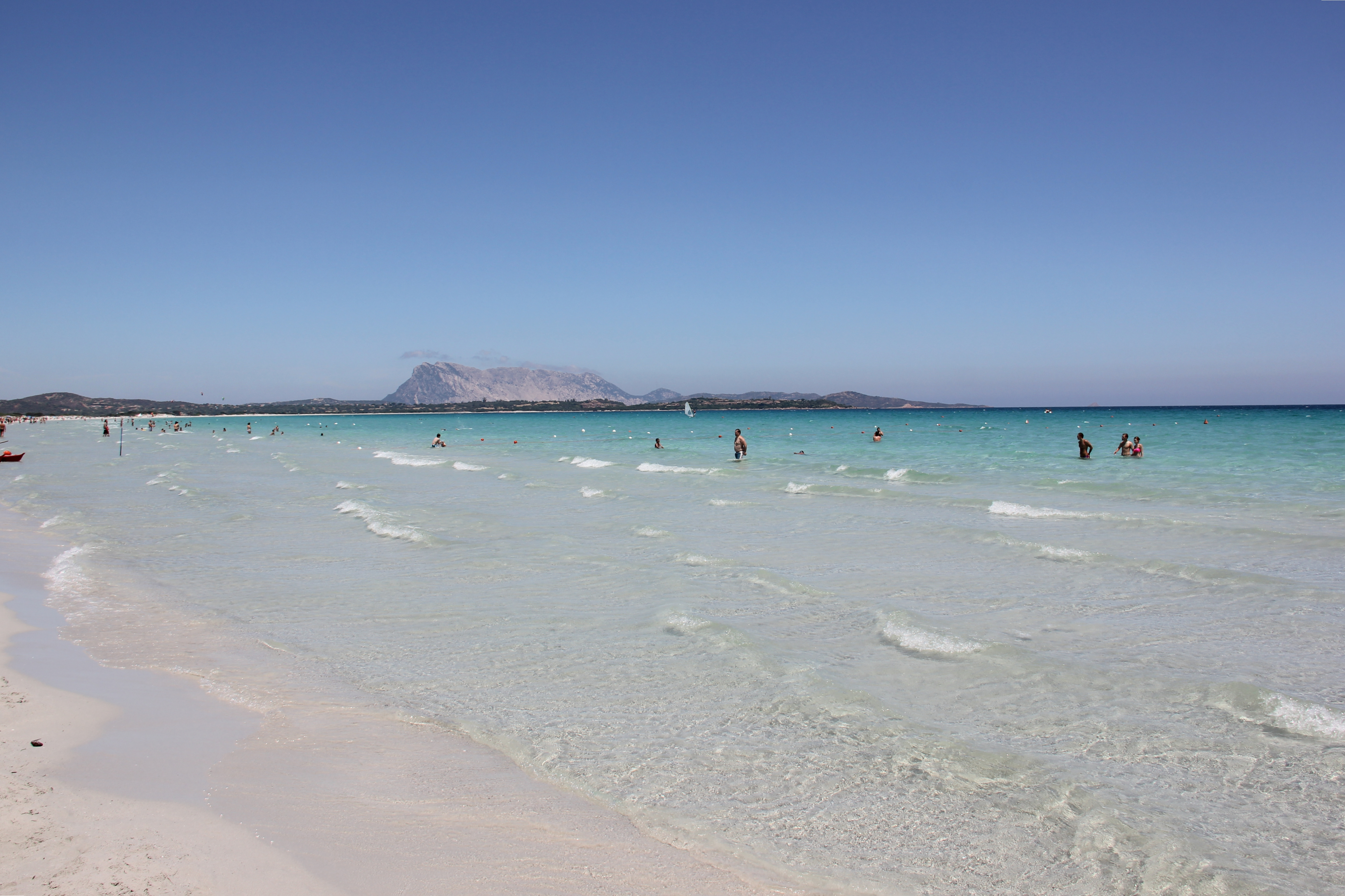 Sardinia